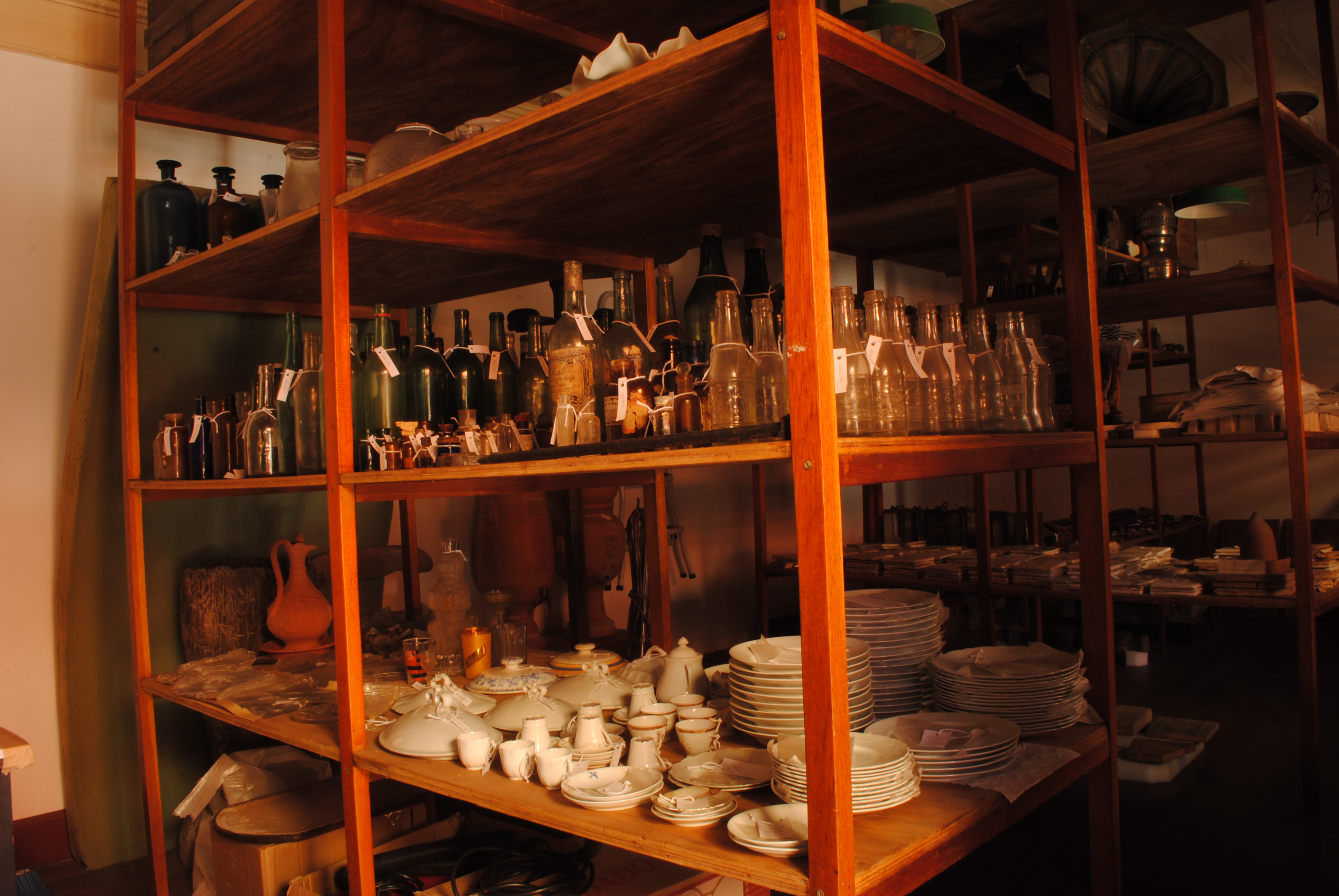 Espaço destinado a guarda do acervo fora de exposição do Museu Casa Histórica de Alcântara